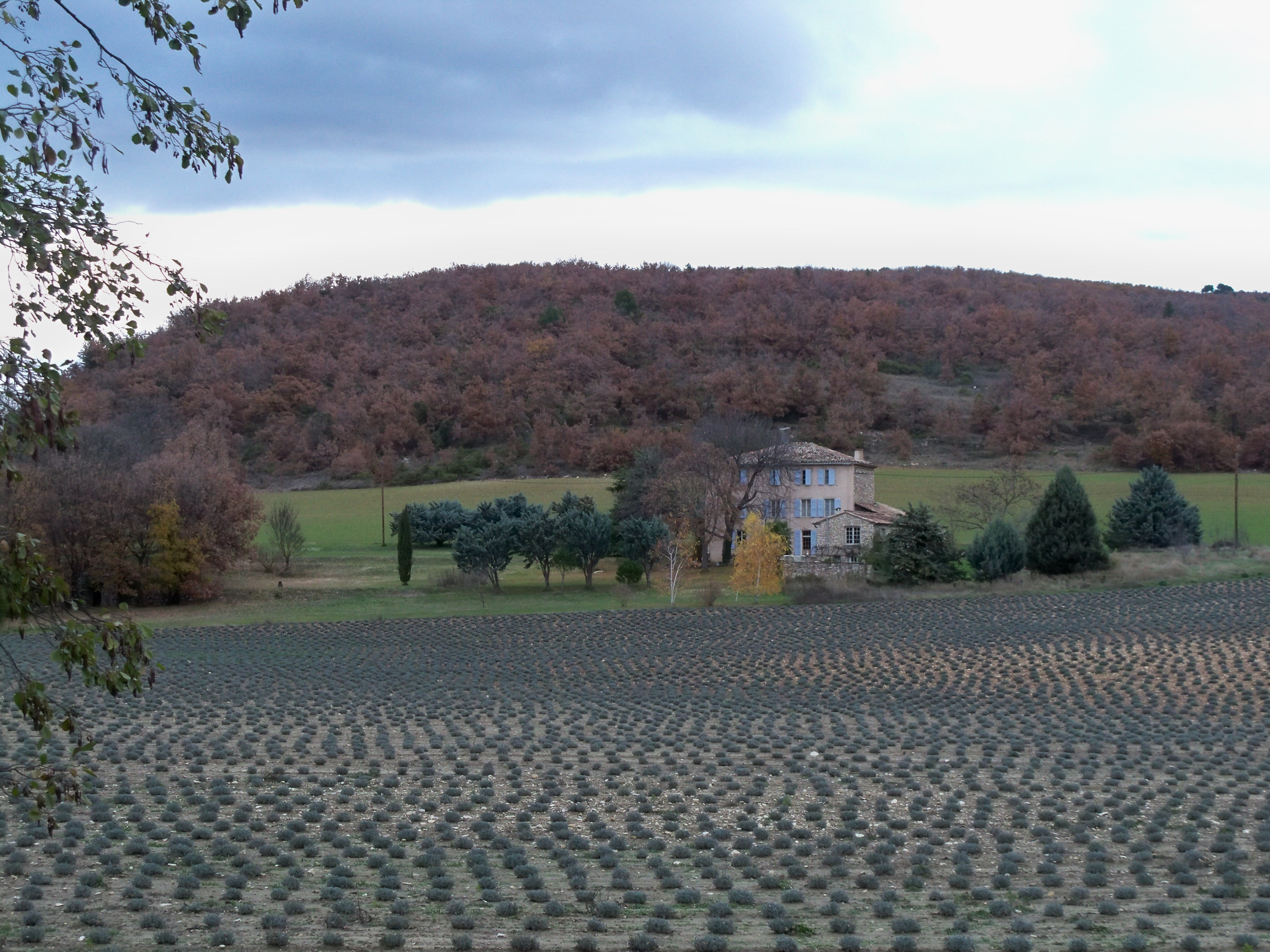 Maison et lavandes près de Sainte Croix à Lauze